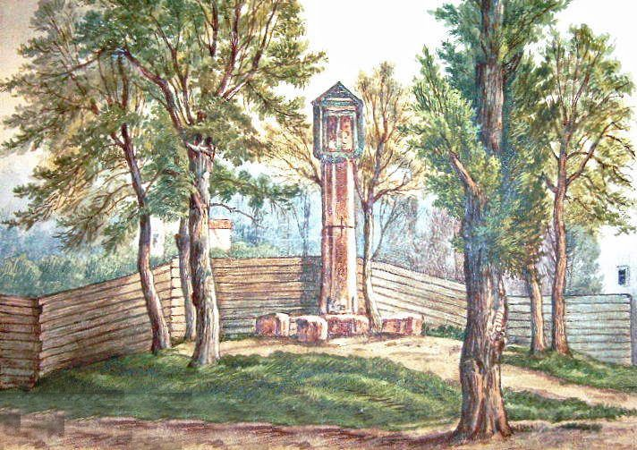 Das Connewitzer Kreuz um 1890 mit dahinter liegender Gärtnerei